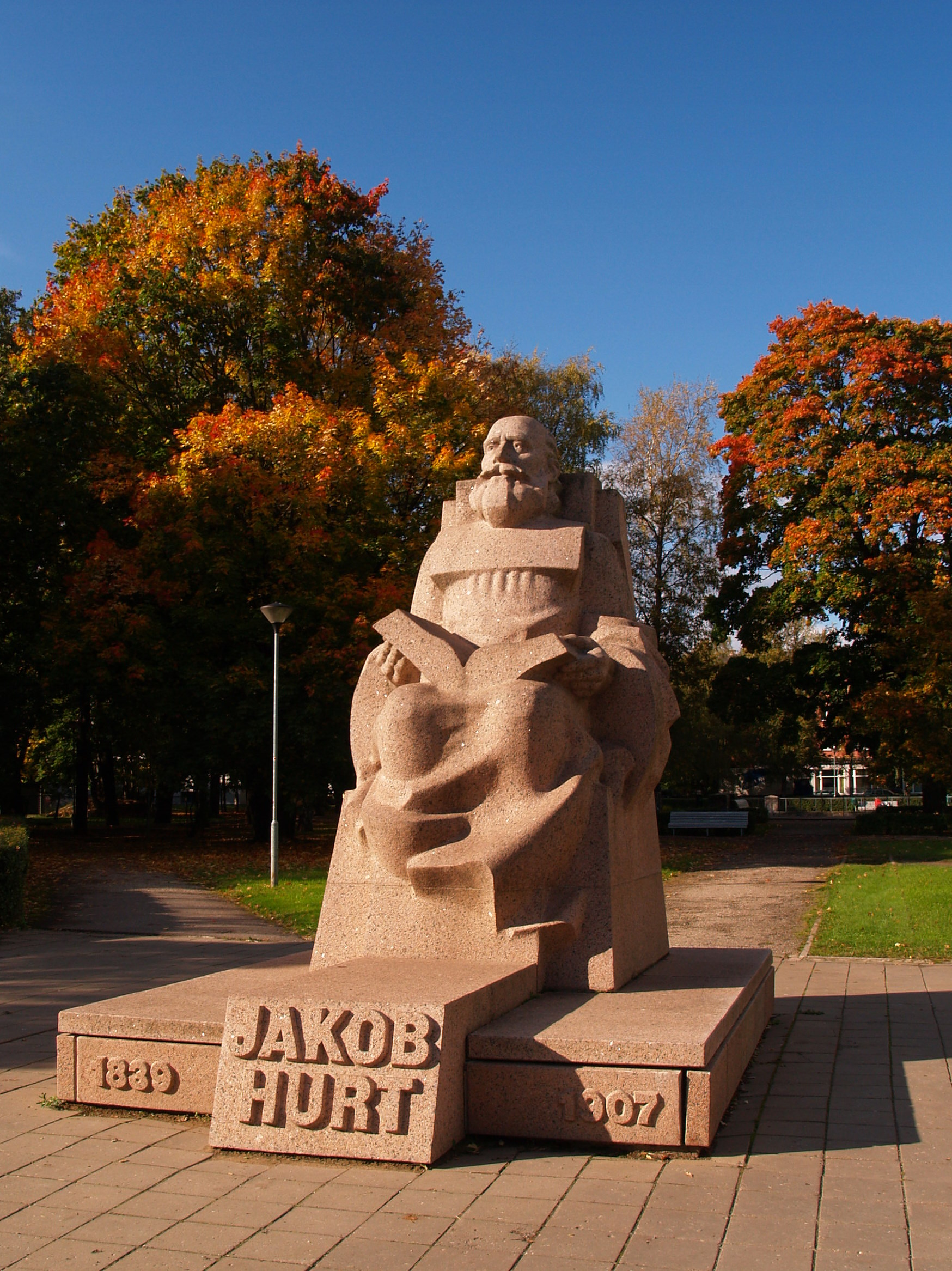 Jakob Hurda monument Vanemuise pargis Tartus.